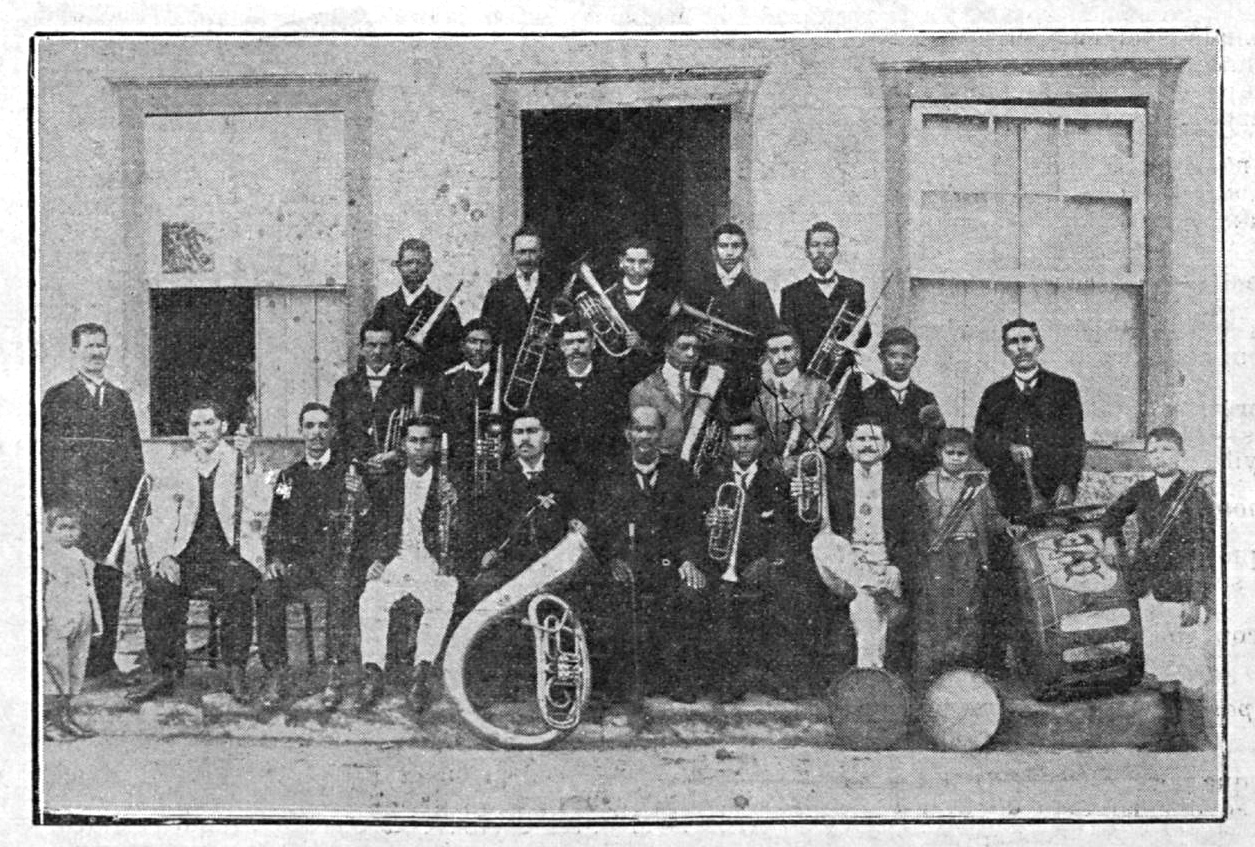 Banda Euterpe, de Pindamonhangaba, dirigida por João Antônio Romão, em 1907. Foto reproduzida na revista "O Malho", Rio de Janeiro, ano 6, n.253, 20 jul. 1907, p.23.